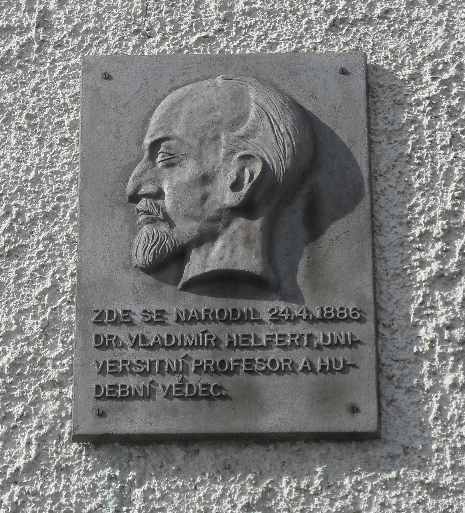 Fotografie Plánického rodného domu Vladimíra Helferta.